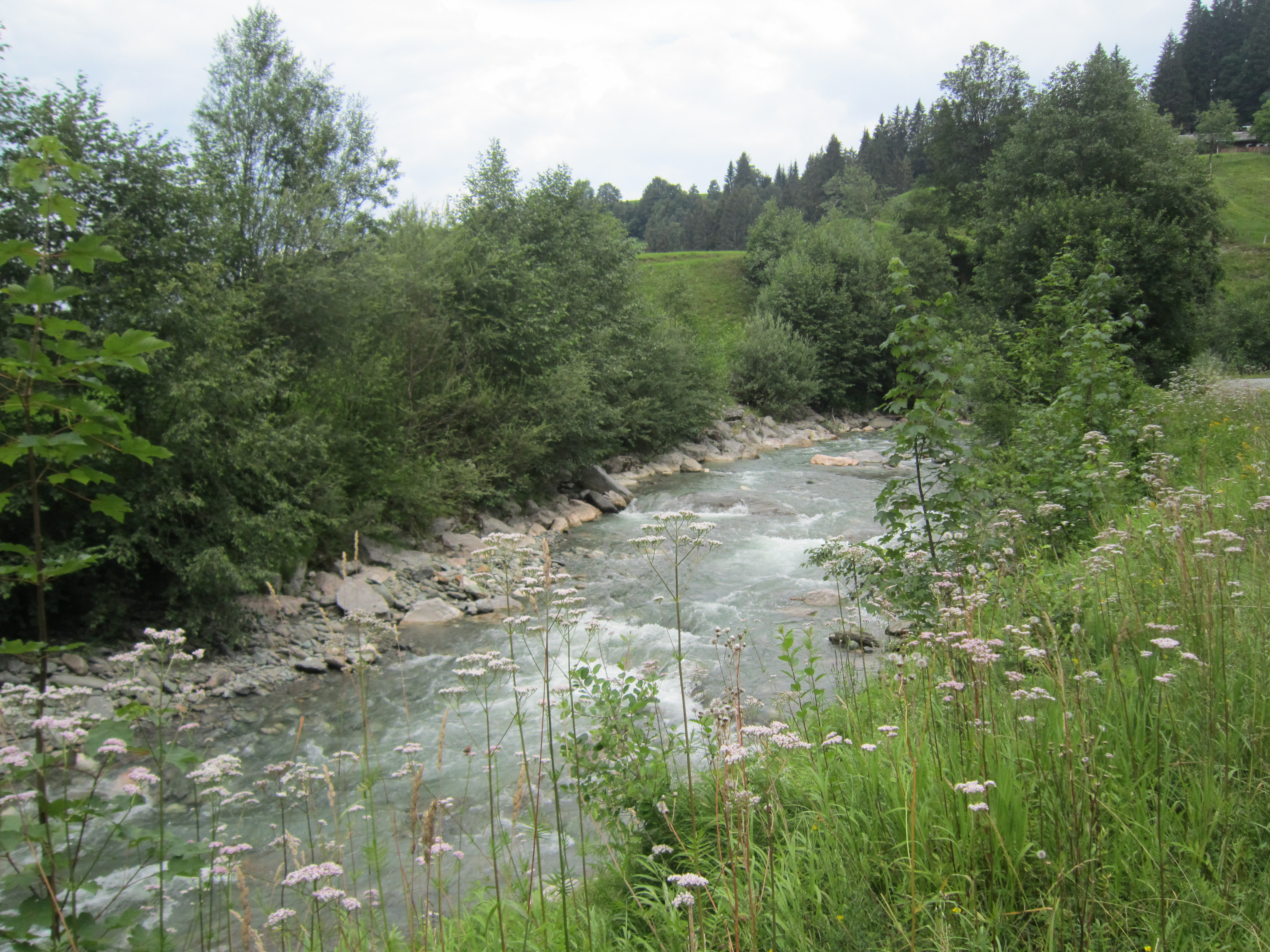 Windauer Ache in Unterwindau (Westendorf / Tirol)